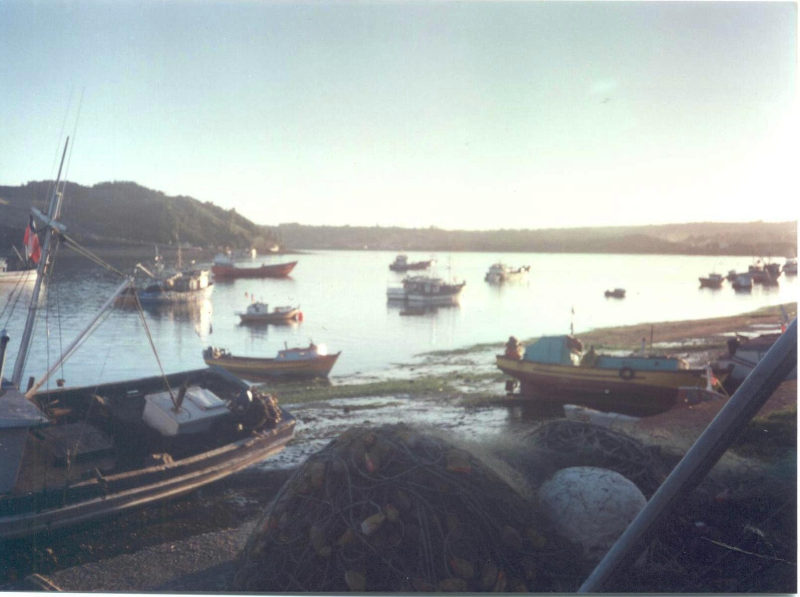 Atardecer en el canal Dalcahue, Dalcahue, Chile